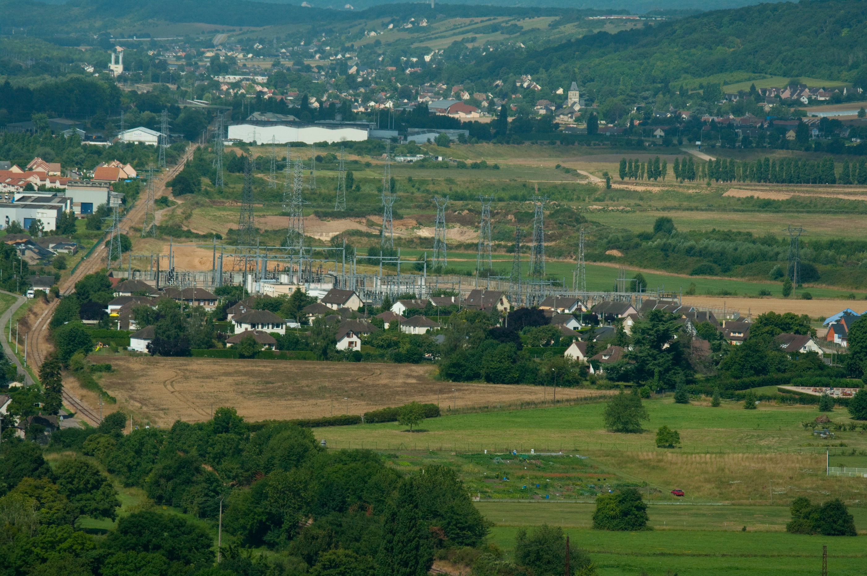 Photographie des Varennes depuis la colline des Deux-Amants